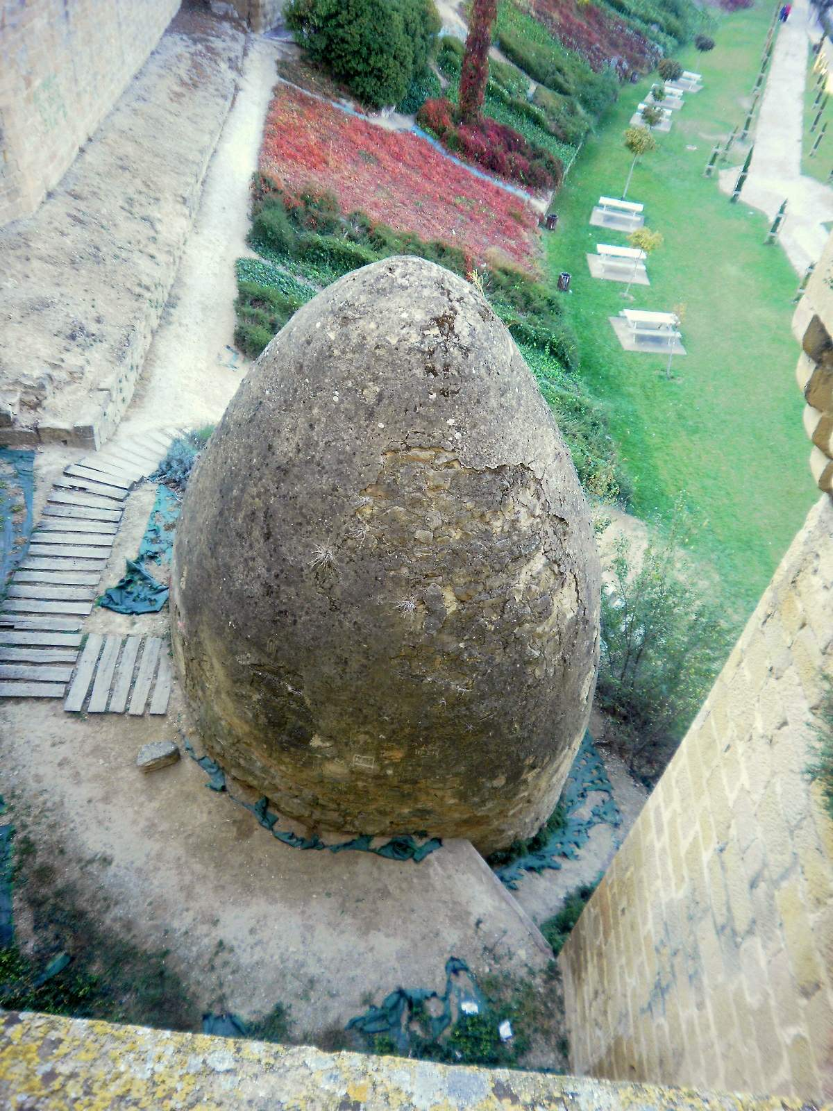 Pozo de Hielo del Palacio Real de Olite (Navarra)